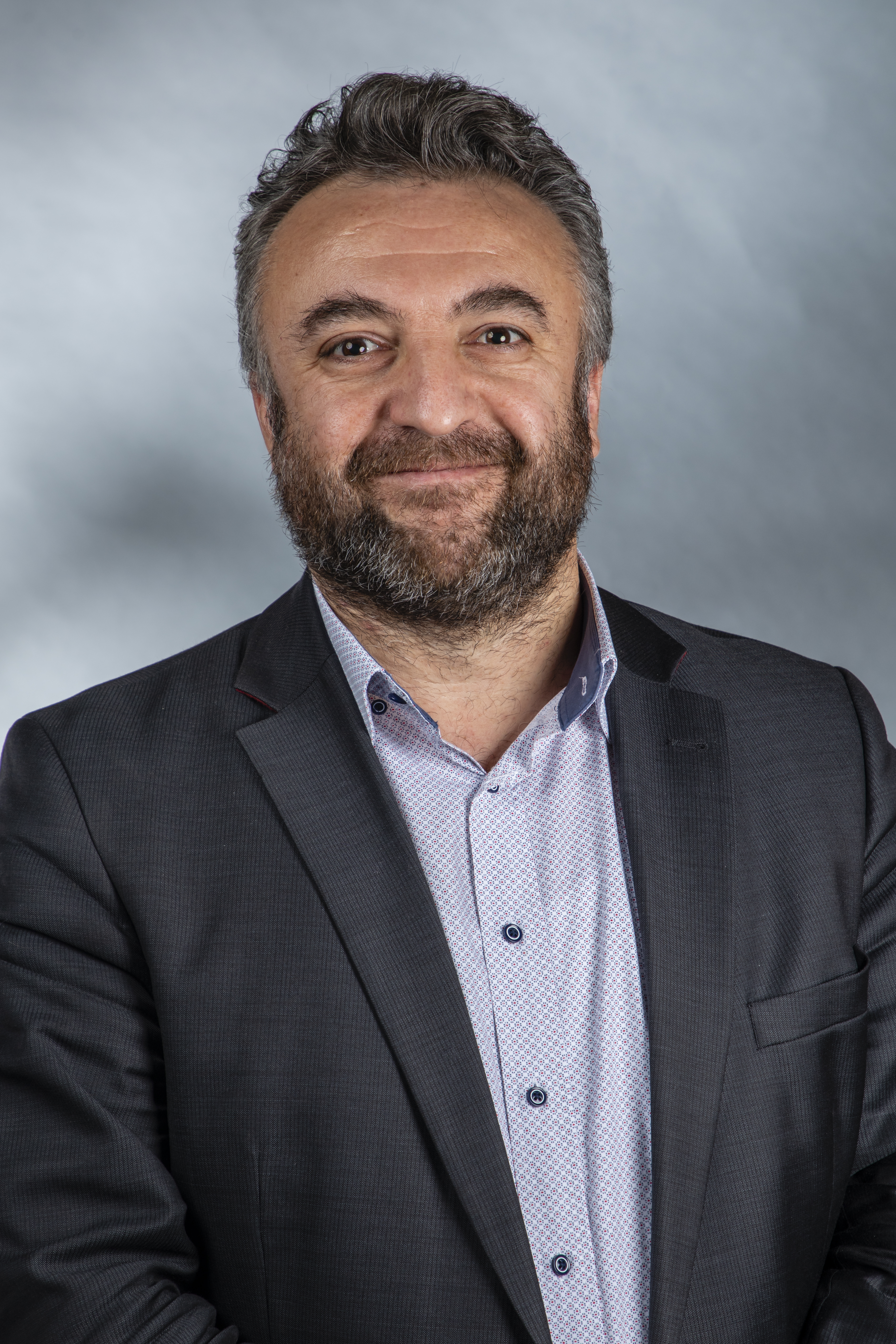 Cindi Tuncel